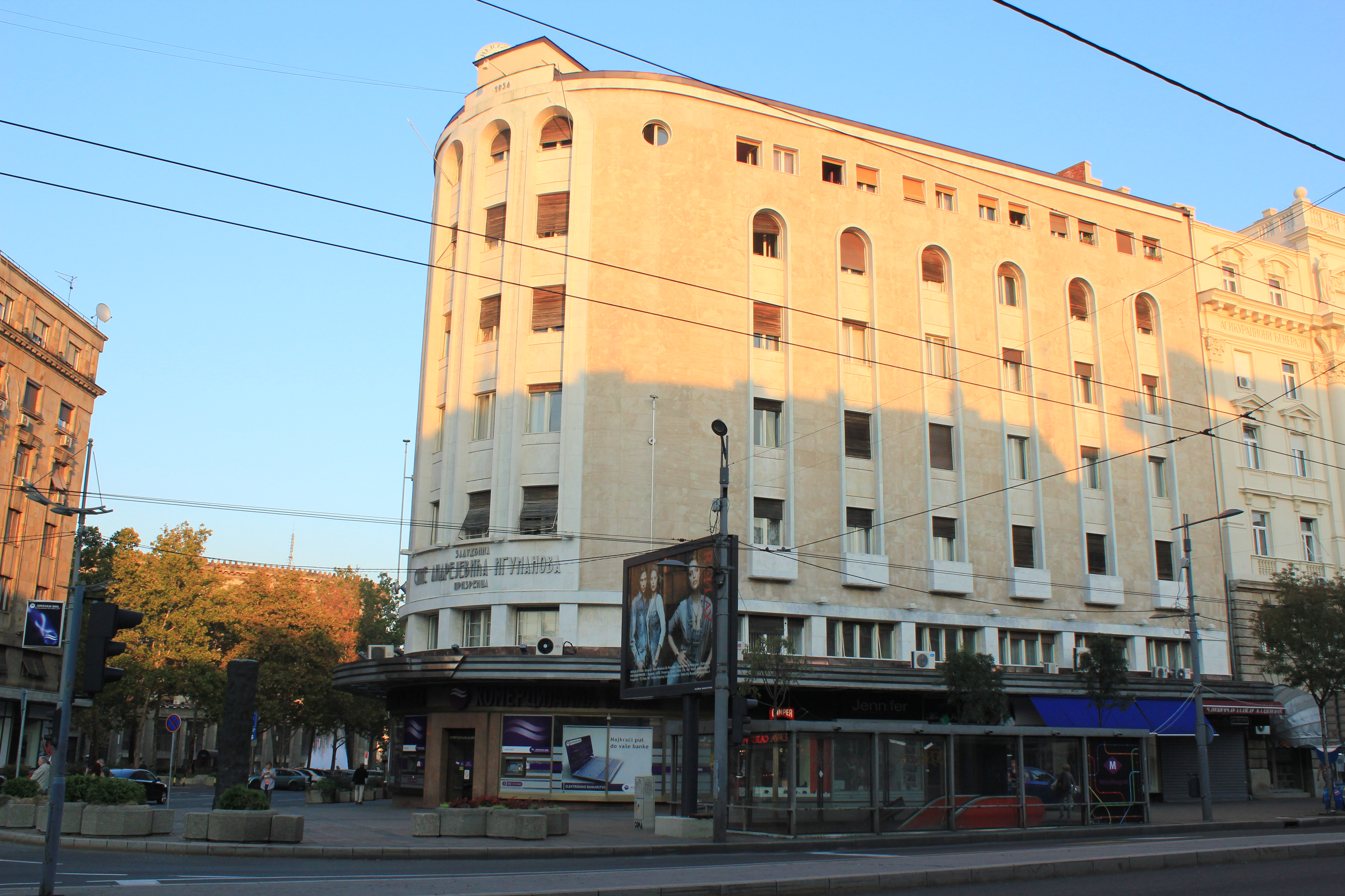 Zadužbina Sime Andrejevića Igumanova - Prizrenca